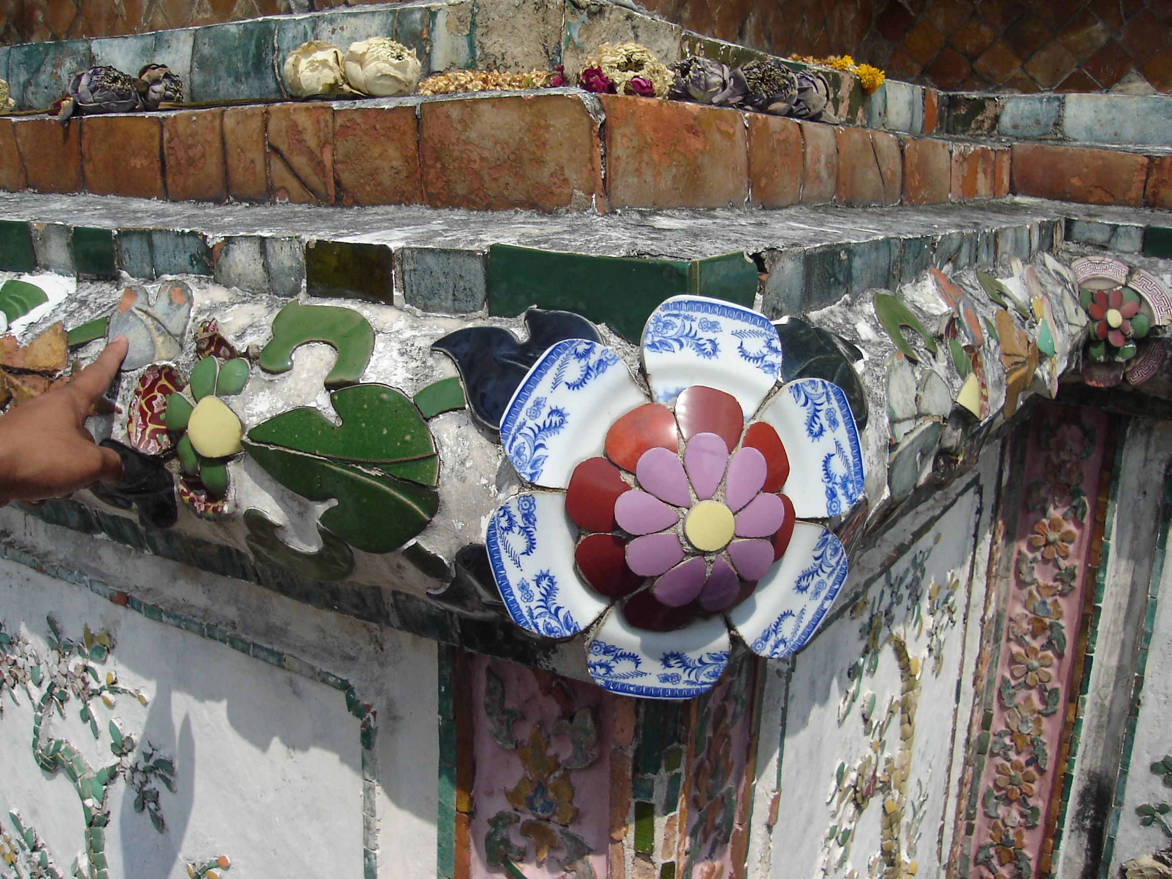 Wat Arun in Bangkok Tailand